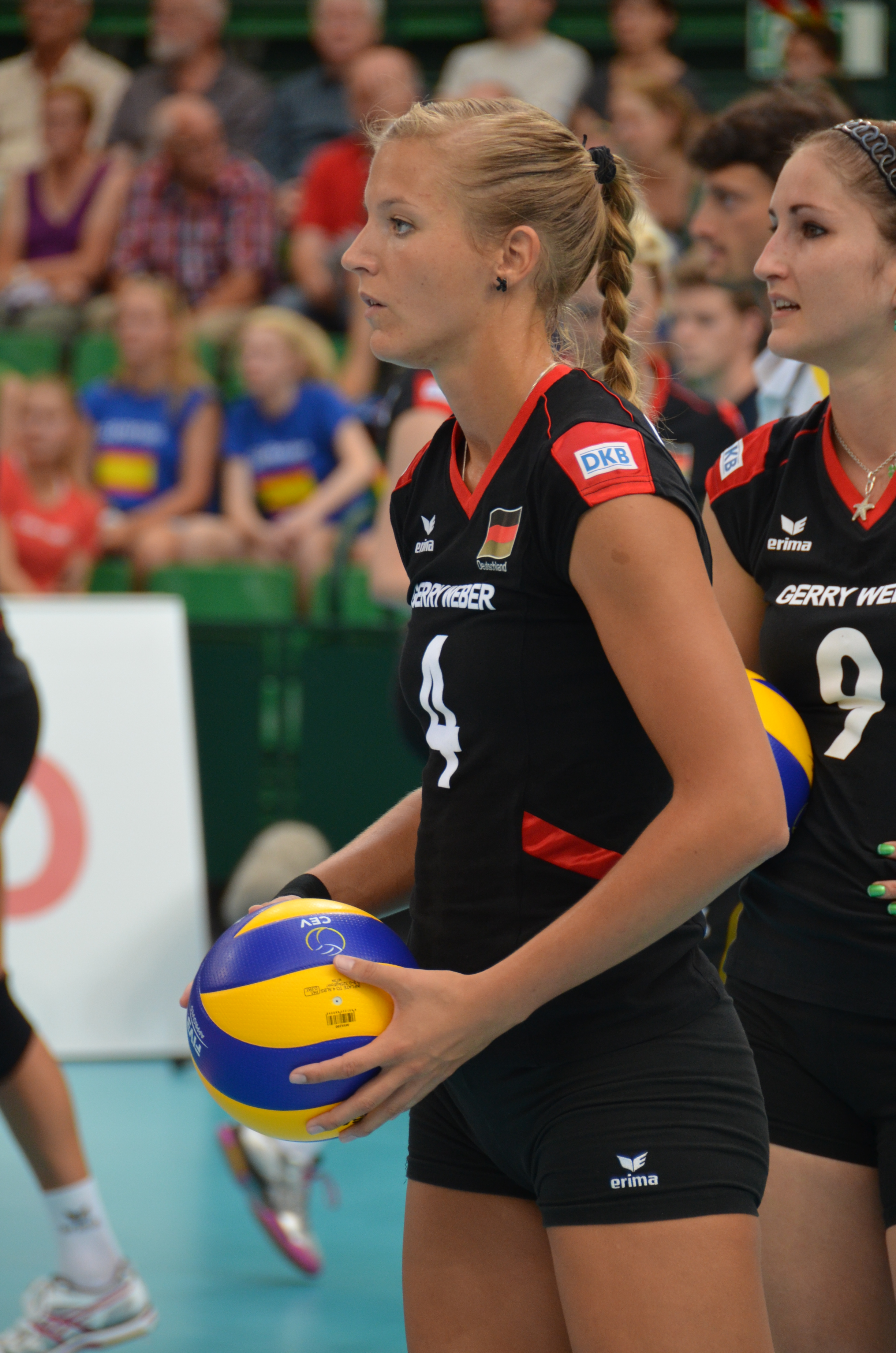 Volleyball-Europameisterschaft der Frauen 2013-Spielort Halle (Westf) Gerry-Weber-Stadion - Spiel 6. September 2013 (Deutschland-Spanien)